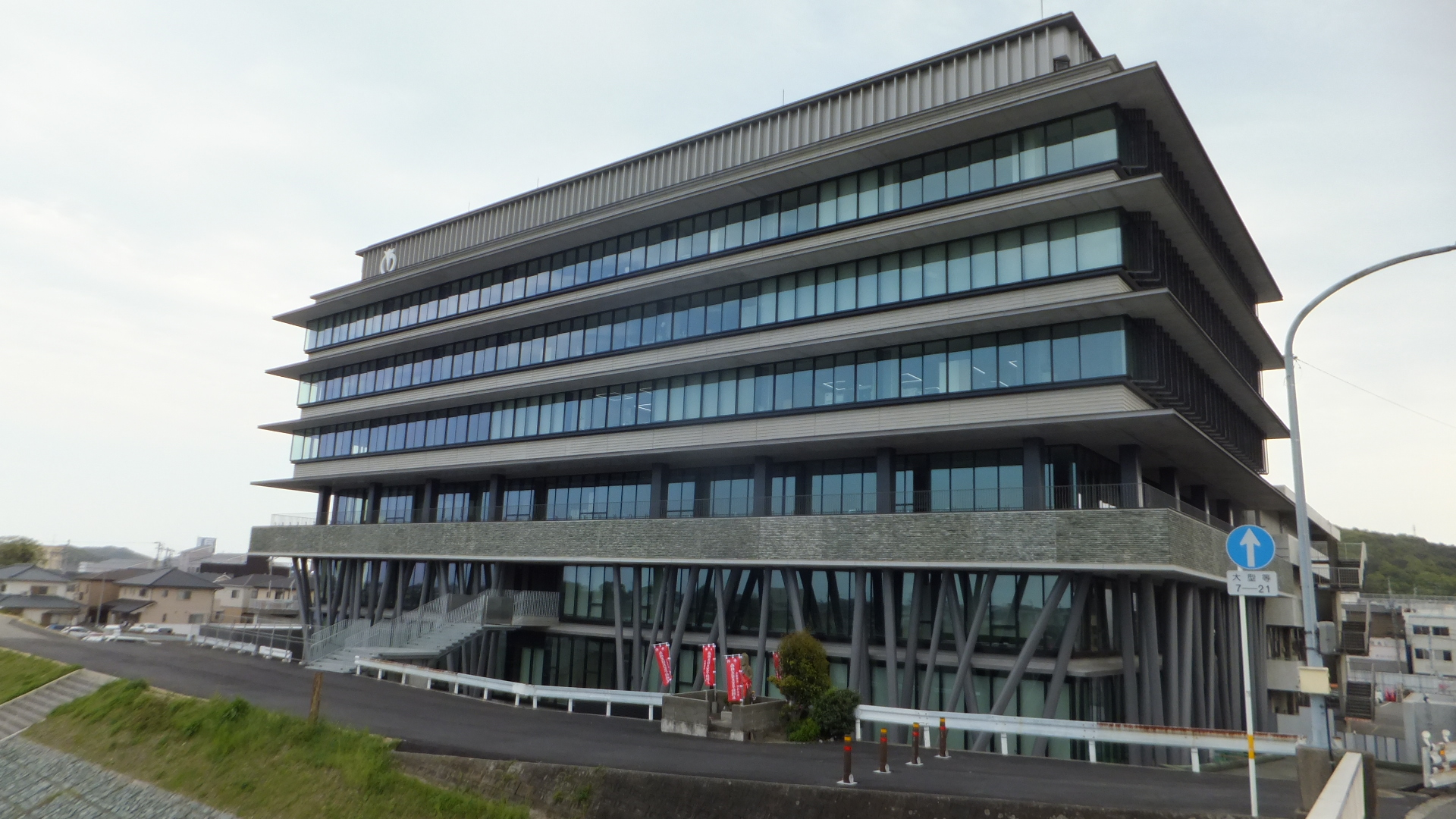 阿南市役所（2015年4月17日）